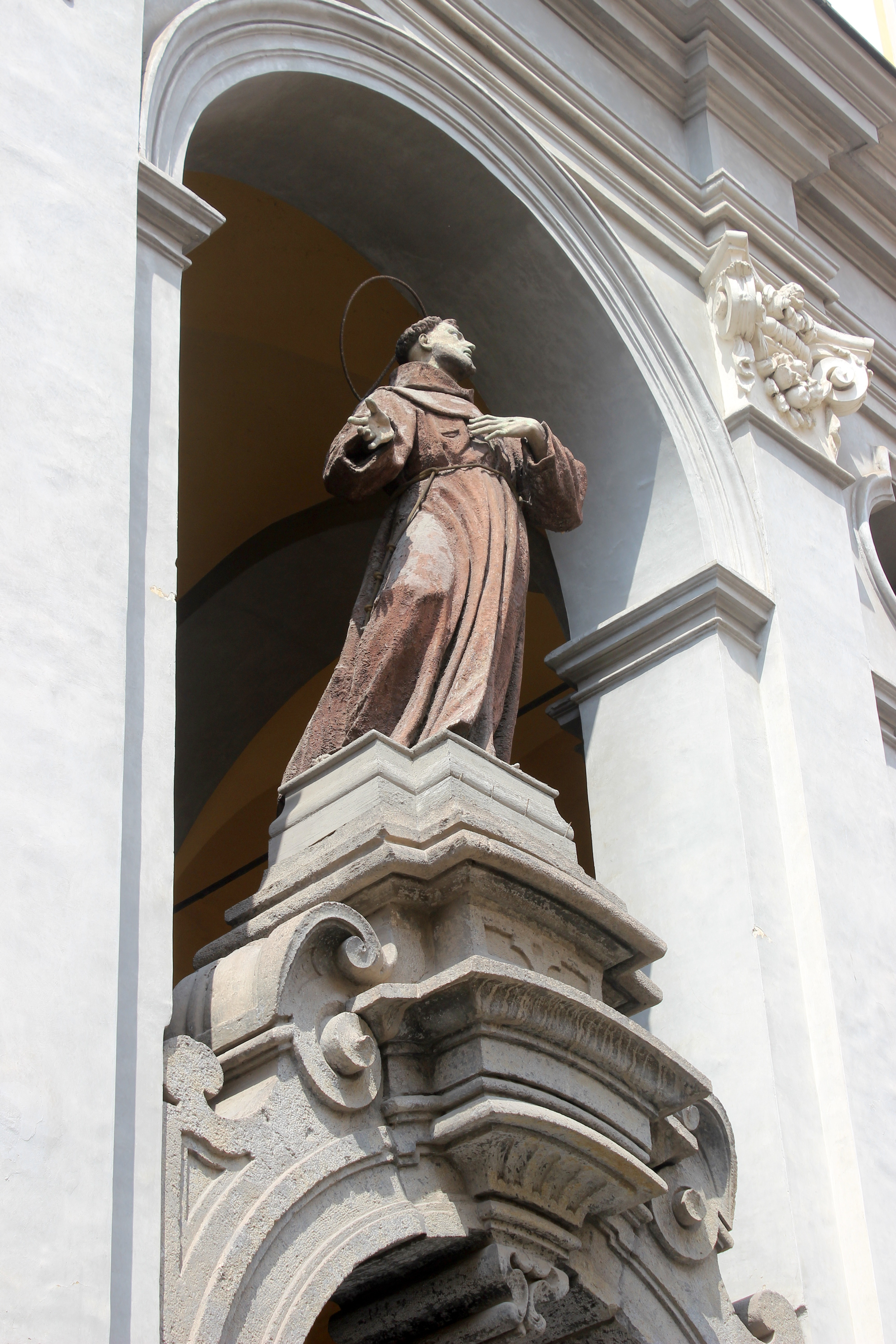 Nápoles. San Francesco degli Scarioni. Fachada.